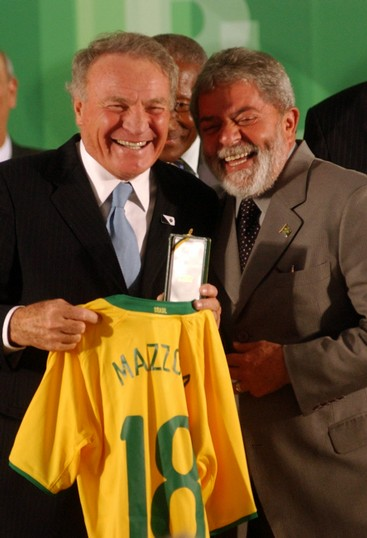 O ex-jogador da Seleção de 58, Mazzola, e o presidente Lula durante comemorações aos 50 anos do primeiro título da Copa do Mundo conquistado pelo Brasil em 1958, no Palácio do Planalto